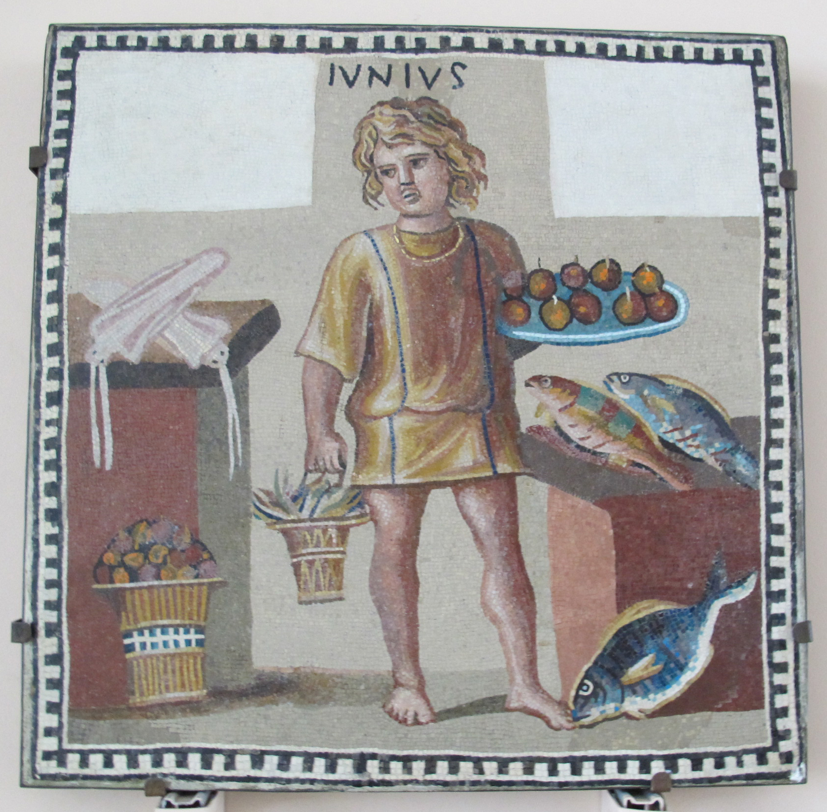 Mosaico di un giovane come mese di giugno, III secolo dc.